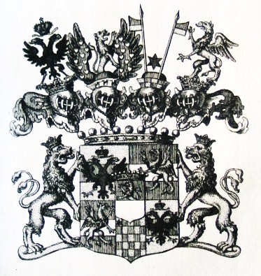 Wappen Graf und Edler Herr von und zu Eltz genannt Faust von Stromberg bzw. Gräfin und Edle Herrin von und zu Eltz genannt Faust von Stromberg (die unverheirateten Familienmitglieder werden Graf und Edler Sohn von und zu Eltz genannt Faust von Stromberg bzw. Gräfin und Edle Tochter von und zu Eltz genannt Faust von Stromberg genannt)